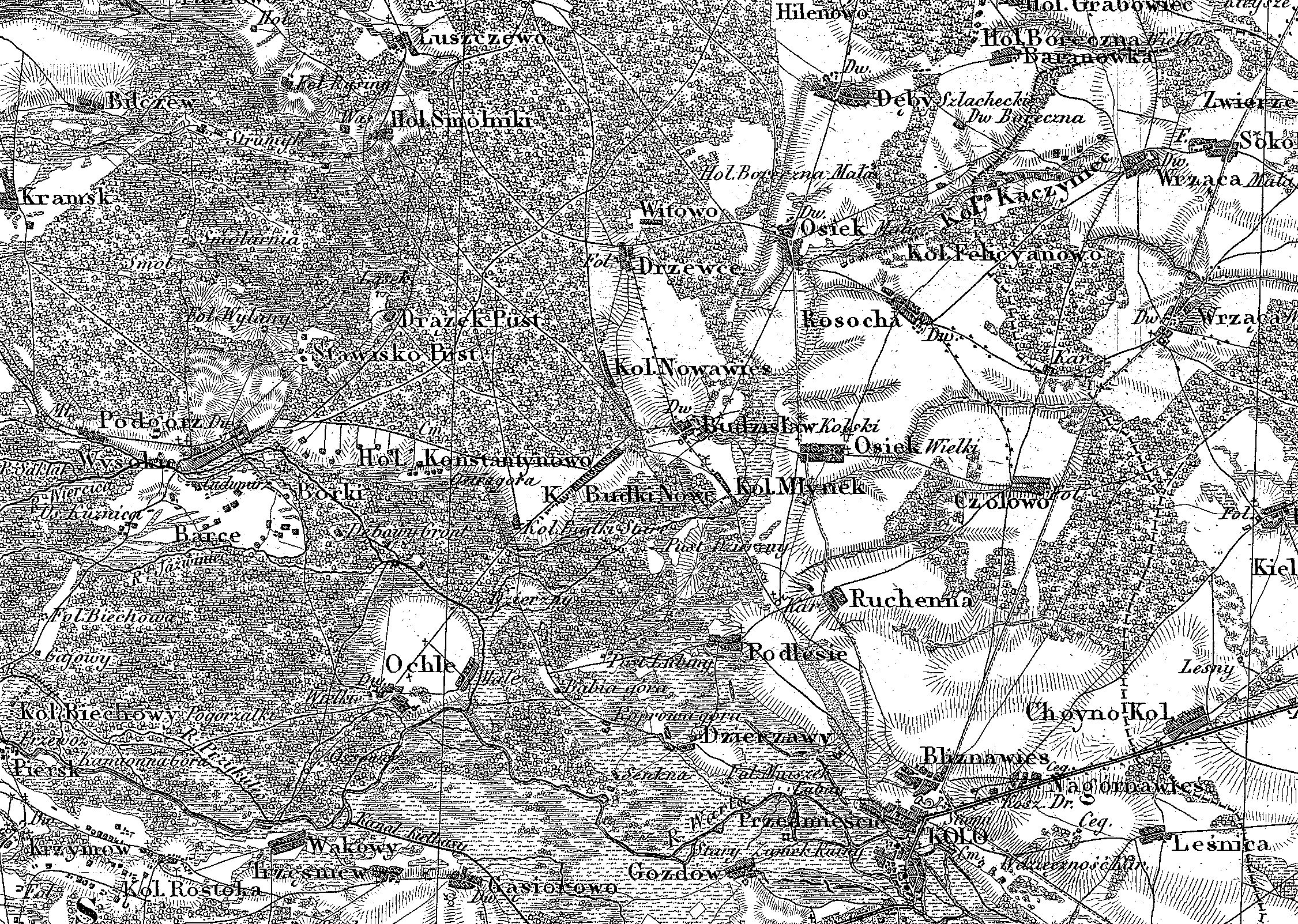 Wycinek mapy (okolice Kutna) z pocz.XIXw. - widoczna miejscowość Drzewce.